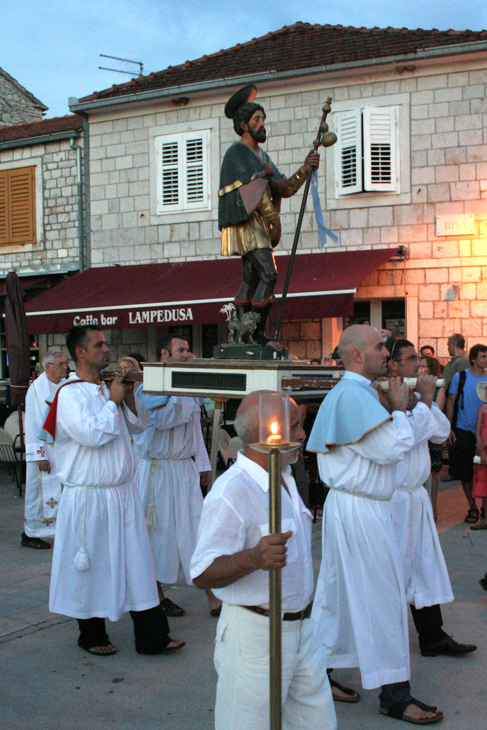 Procesija na blagdan sv. Roka u Starom Gradu